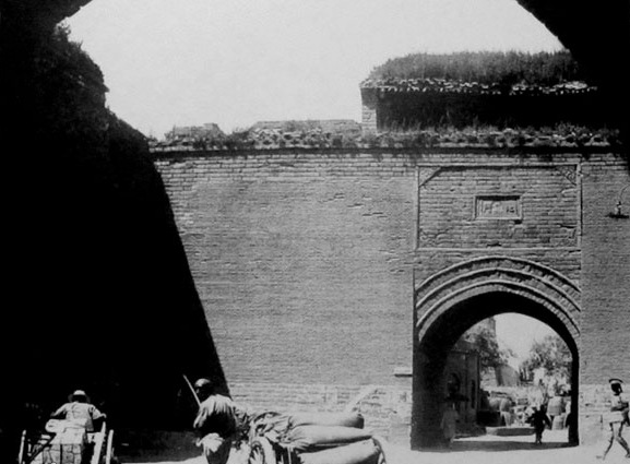 中文（中国大陆）: 沈阳小北门